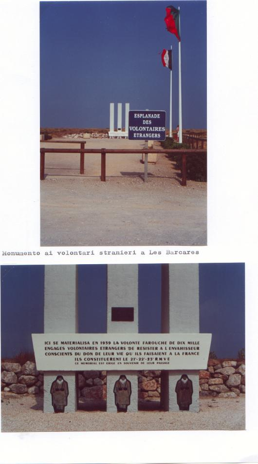 monumento ai volontari stranieri a Les Barcares